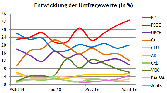 Europawahl-Umfragen Spanien 2019